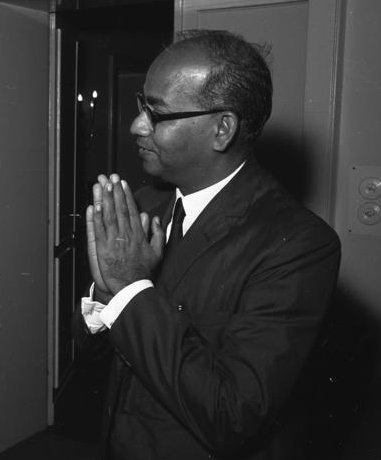 Allah Bukhsh Karim Bukhsh Brohi, Pakistani politician